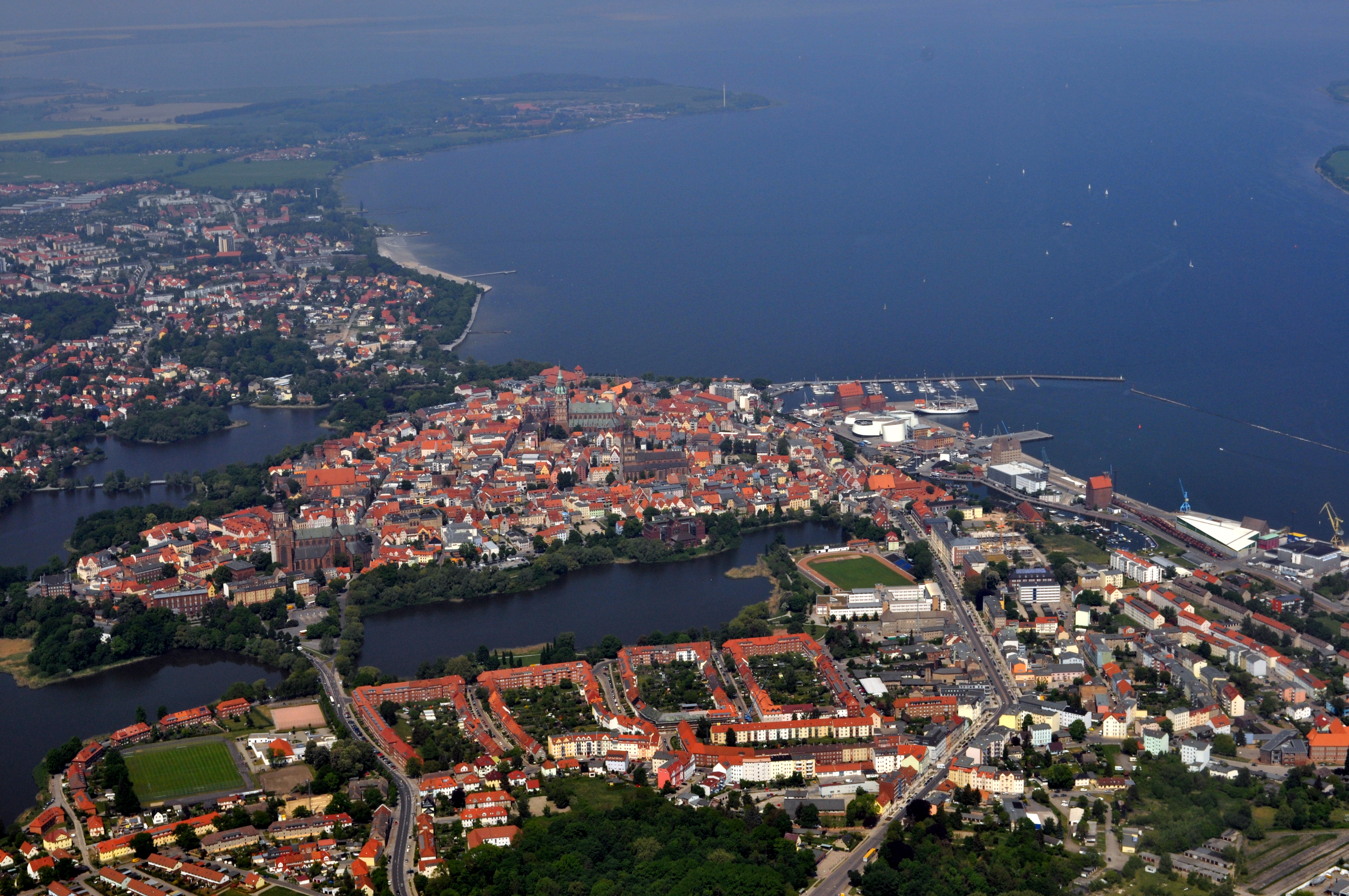 Luftbild der Altstadt von Stralsund. Die Stadt ist umschlossen von Wasser - auf der Landseite von den Wehrteichen, Richtung Rügen vom Strelasund, einer Meerenge bzw. einem Ausläufer der Lagunen des Nationalparks Vorpommersche Boddenlandschaft. Die Bilder wurden von mir während eines einstündigen Rundflugs ab Flugplatz Güttin am 21. Mai 2011 aufgenommen. Die Bildbeschreibung steht im Dateinamen. Aufgenommen mit einer Nikon D5000 durch das Seitenfenster des Flugzeugs.